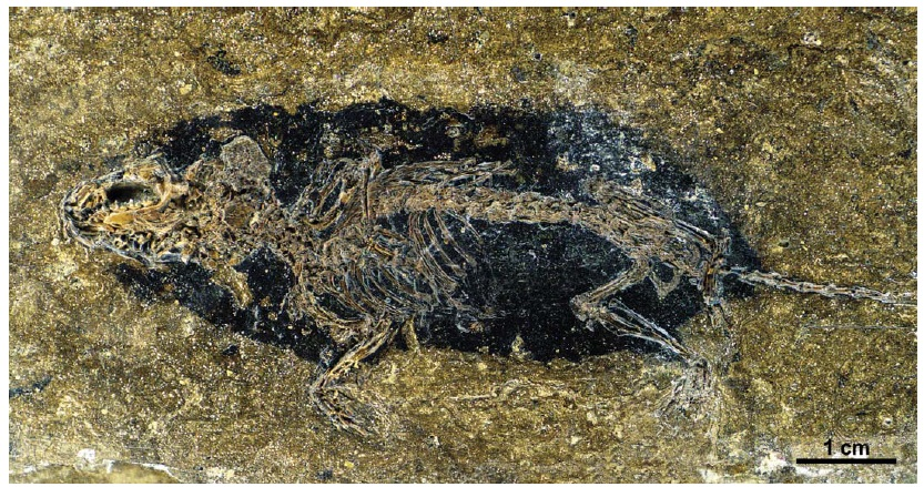 Lusorex taishanensis (holotype), early–middle Miocene of Shanwang, Shandong Province, China (IVPP V 13915). The soft body “shadow” is preserved in black.